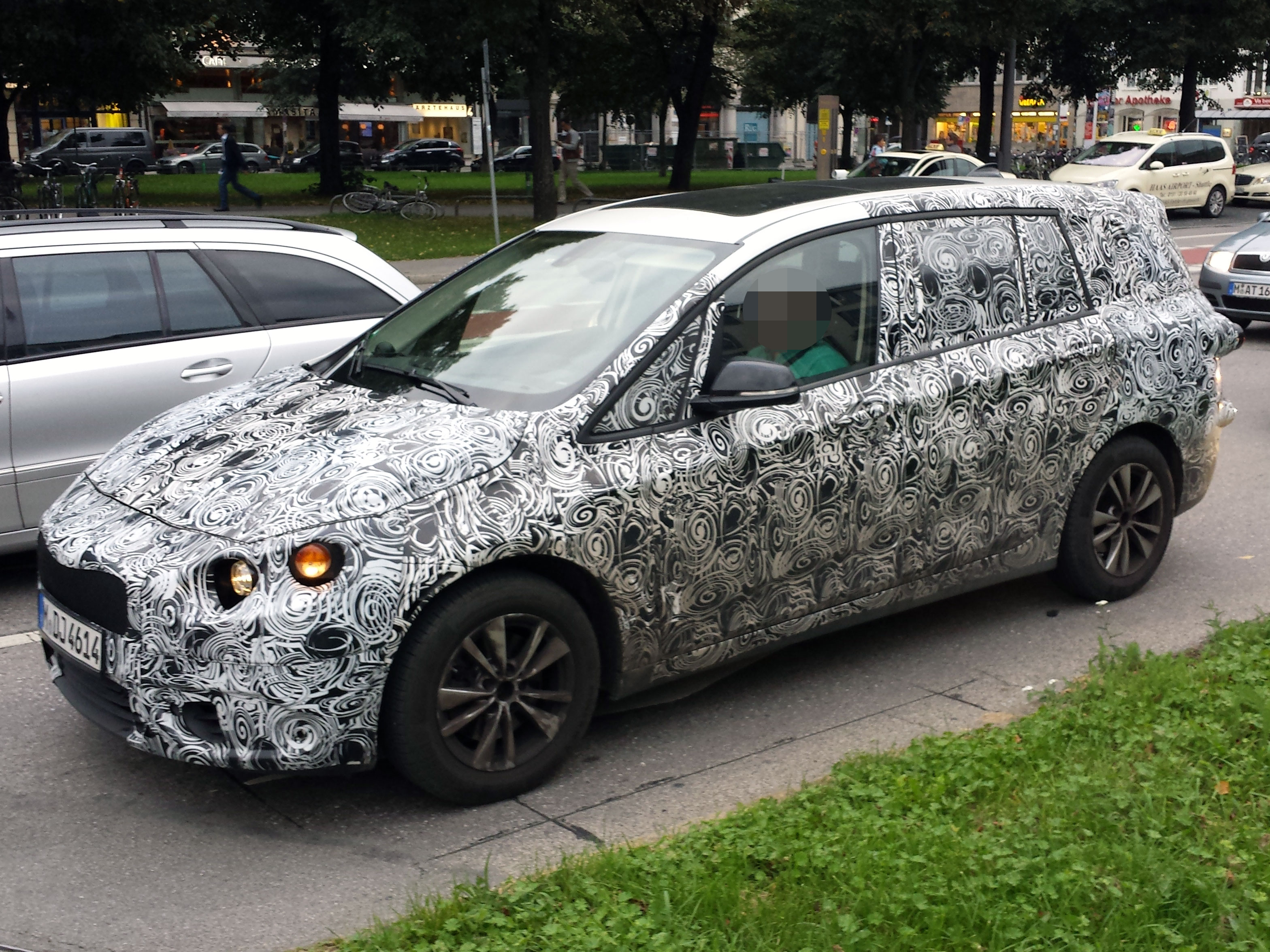 Erlkönig eines BMW 2er Active Tourer Siebensitzer